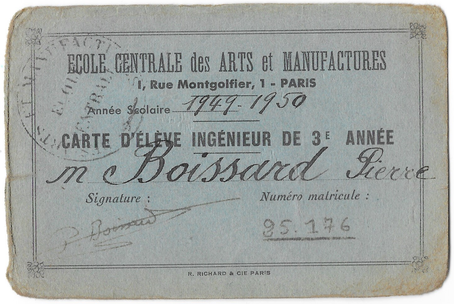 Carte étudiante de l'Ecole Centrale des Arts et Manufactures en 1949